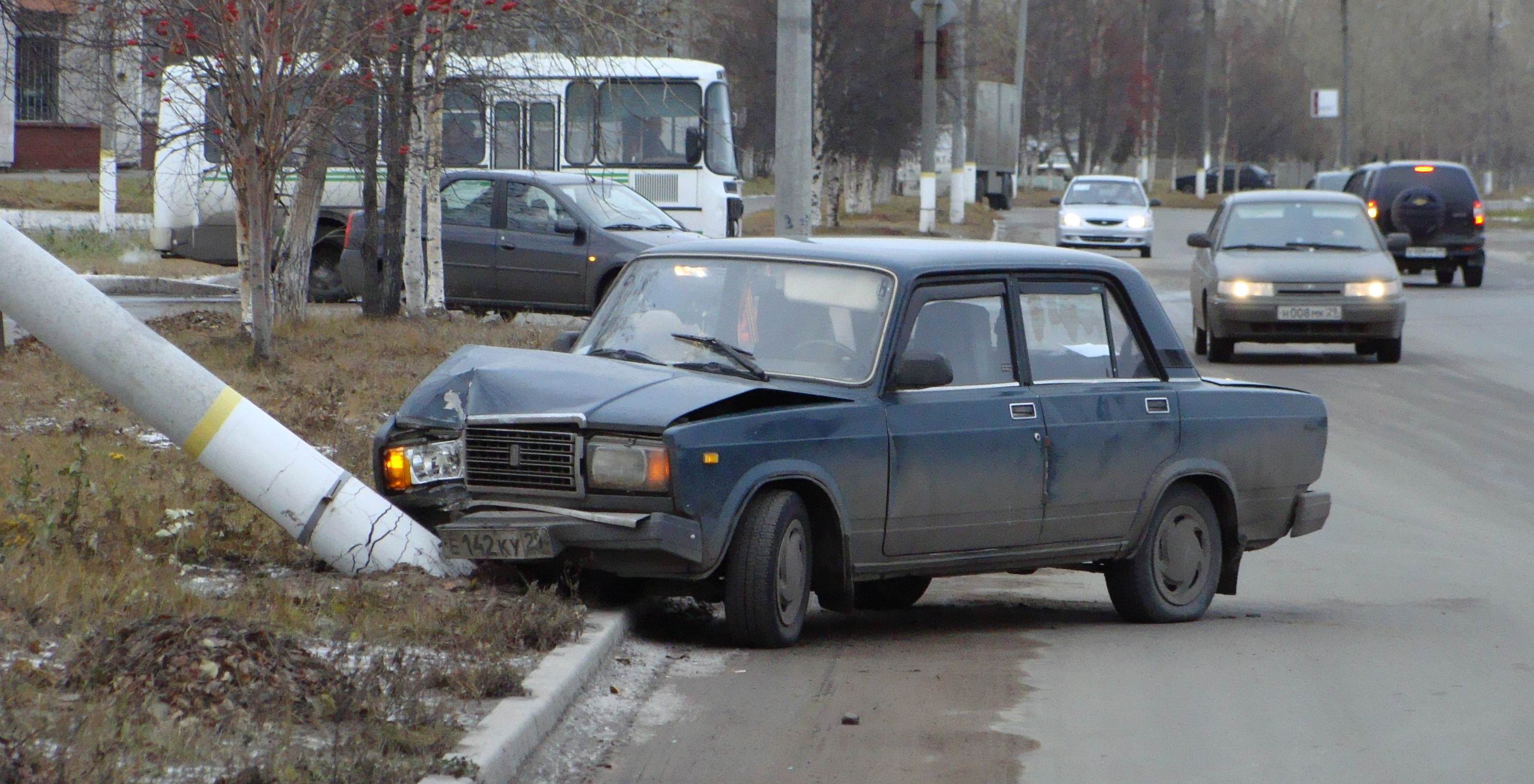 ДТП на улице Октябрьской